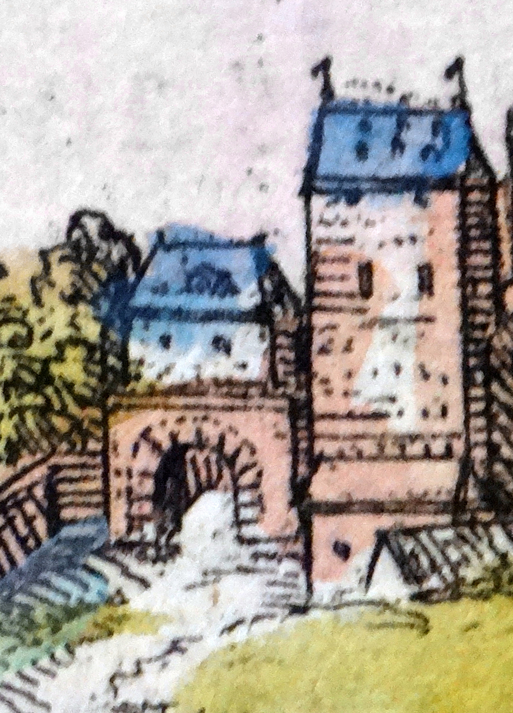 Viehpforte und Bindturm in der äußeren Stadtmauer von Worms. Detail aus: Georg Braun, Simon Novellanus und Franz Hogenberg: Beschreibung und Contrafactur der vornembster Stät der Welt. Heinrich von Ach, Köln 1574. Tafel zwischen den Seiten 35 und 36. Stadtarchiv Worms: Abt. 214 Nr. 1499.